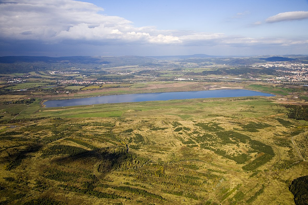 Lake